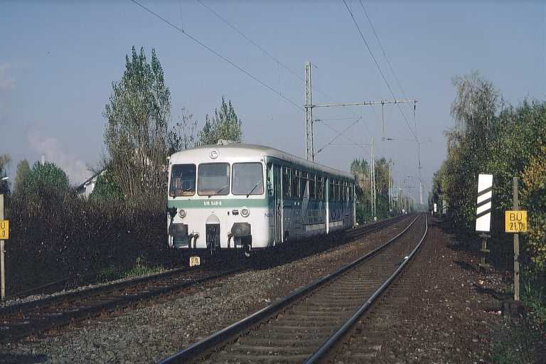 515 548 in grün/weiß in Bochum